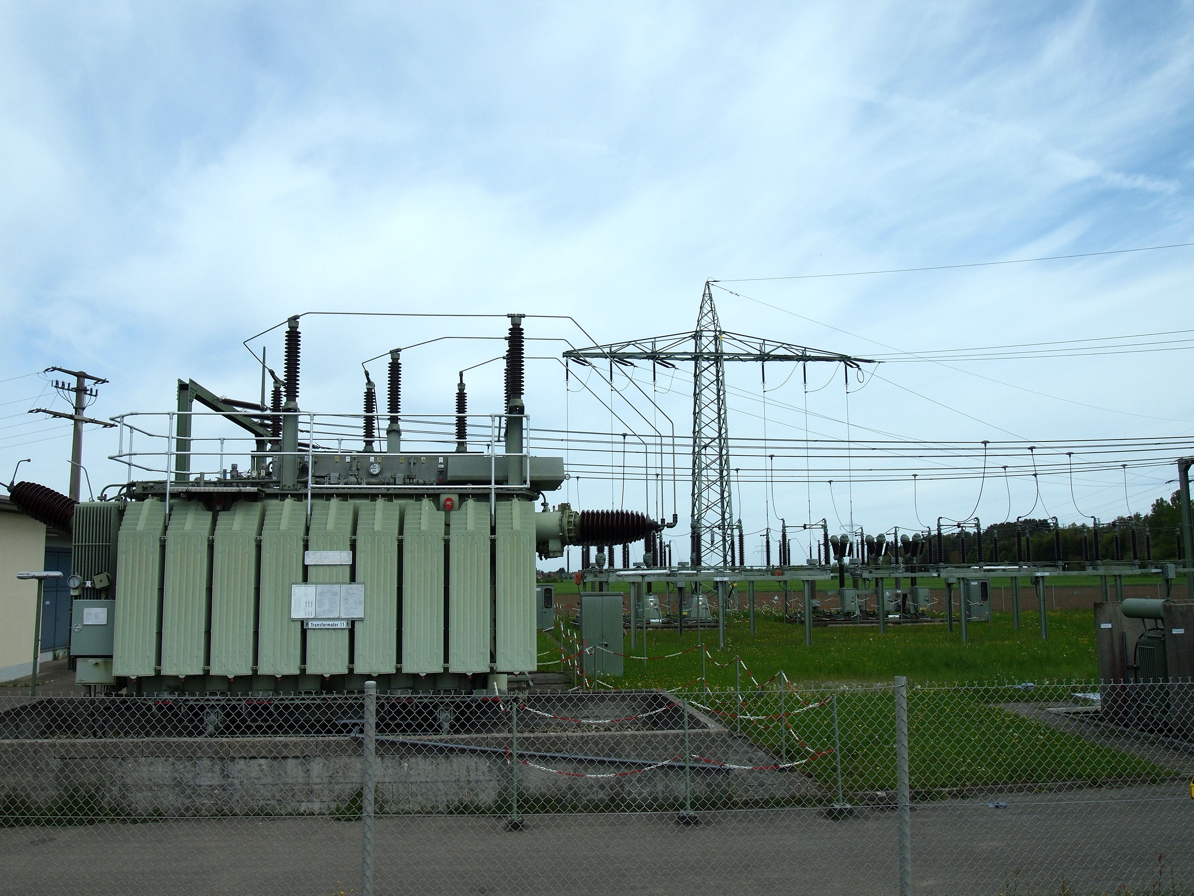 Transformator 11 im Umspannwerk Nr. 730 in Leinau, Gemeinde Pforzen. Das Umspannwerk ist eines von zwei Umspannwerken, welche die Stadt Kaufbeuren mit Strom versorgen. Trafo Nr. 11: Lepper Dominit, 40 MVA, 110kV/10KV, Baujahr 1978